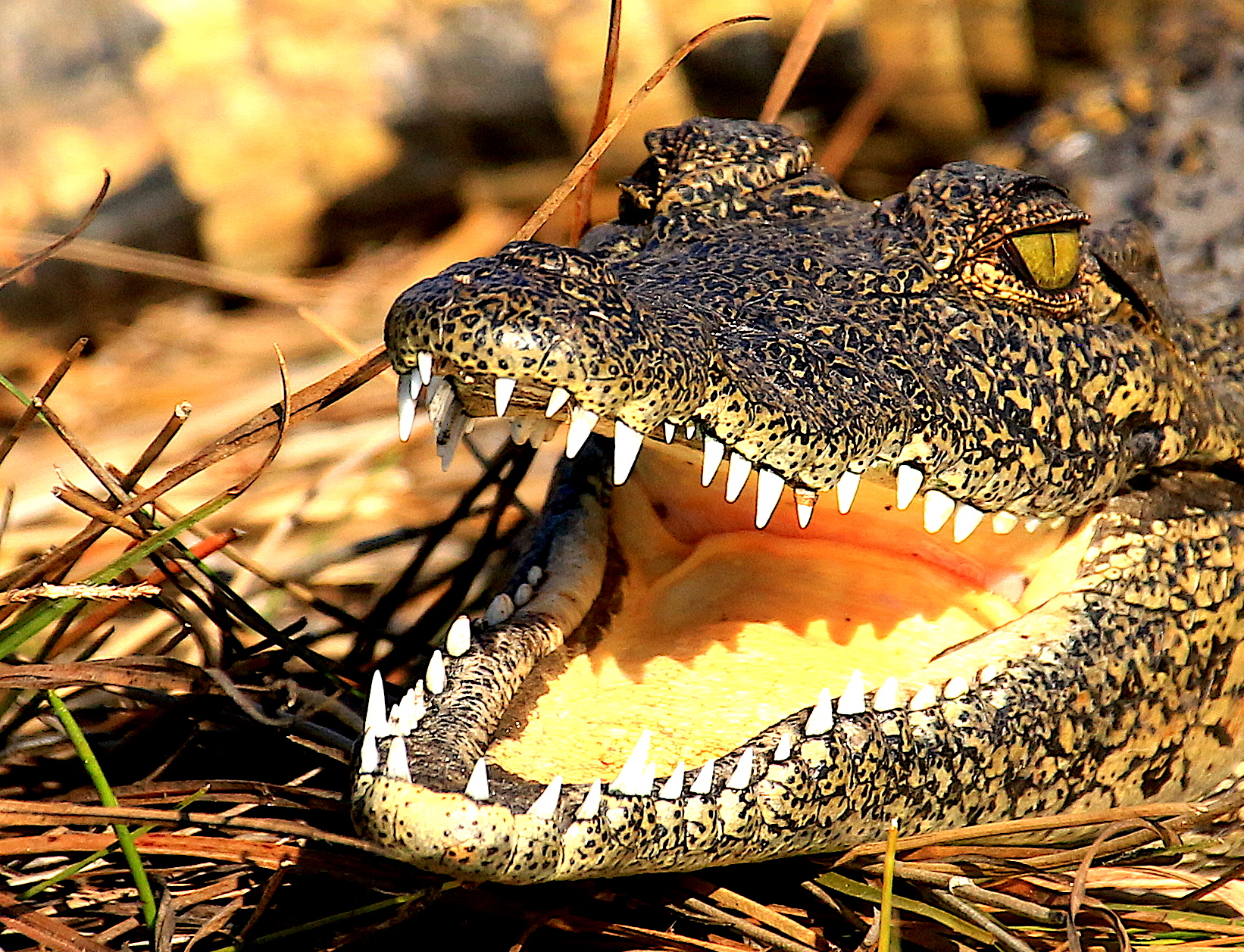 Krokodil im Okavangodelta (2019)